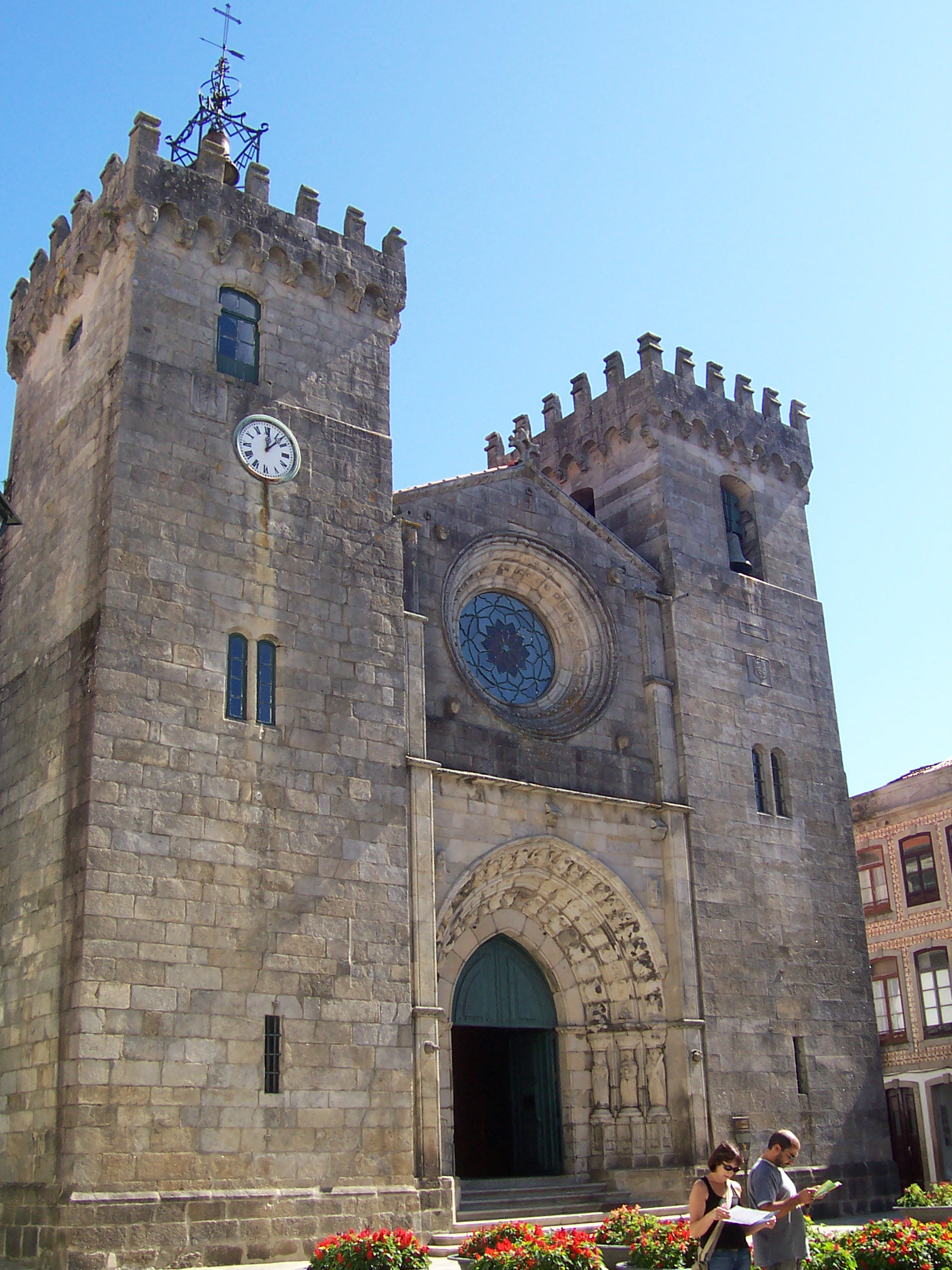 Viana do Castelo Cathedral